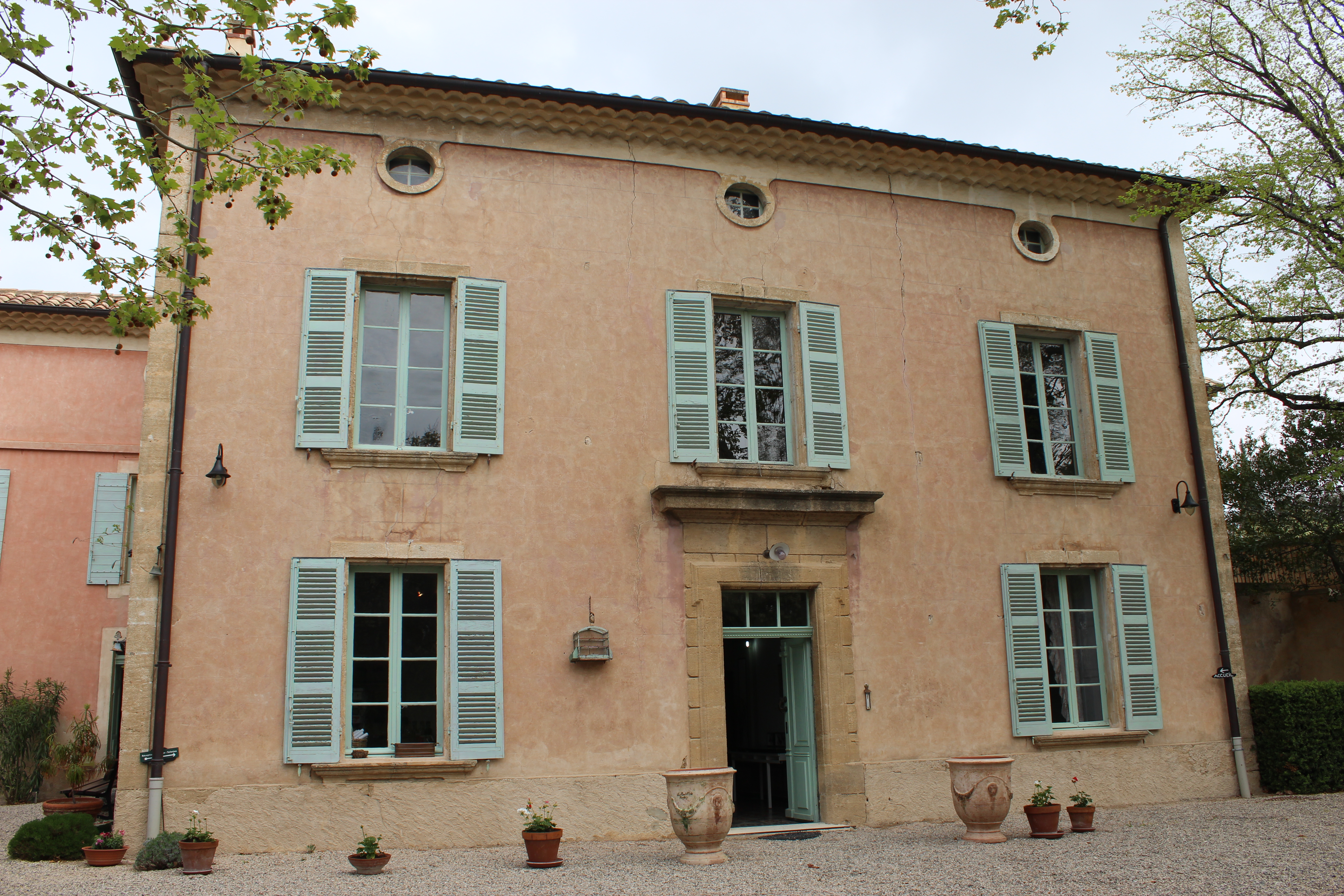 Wohnhaus von Jean-Henri Fabre bis zu dessen Tode 1915, heutiger Sitz des Museums Harmas